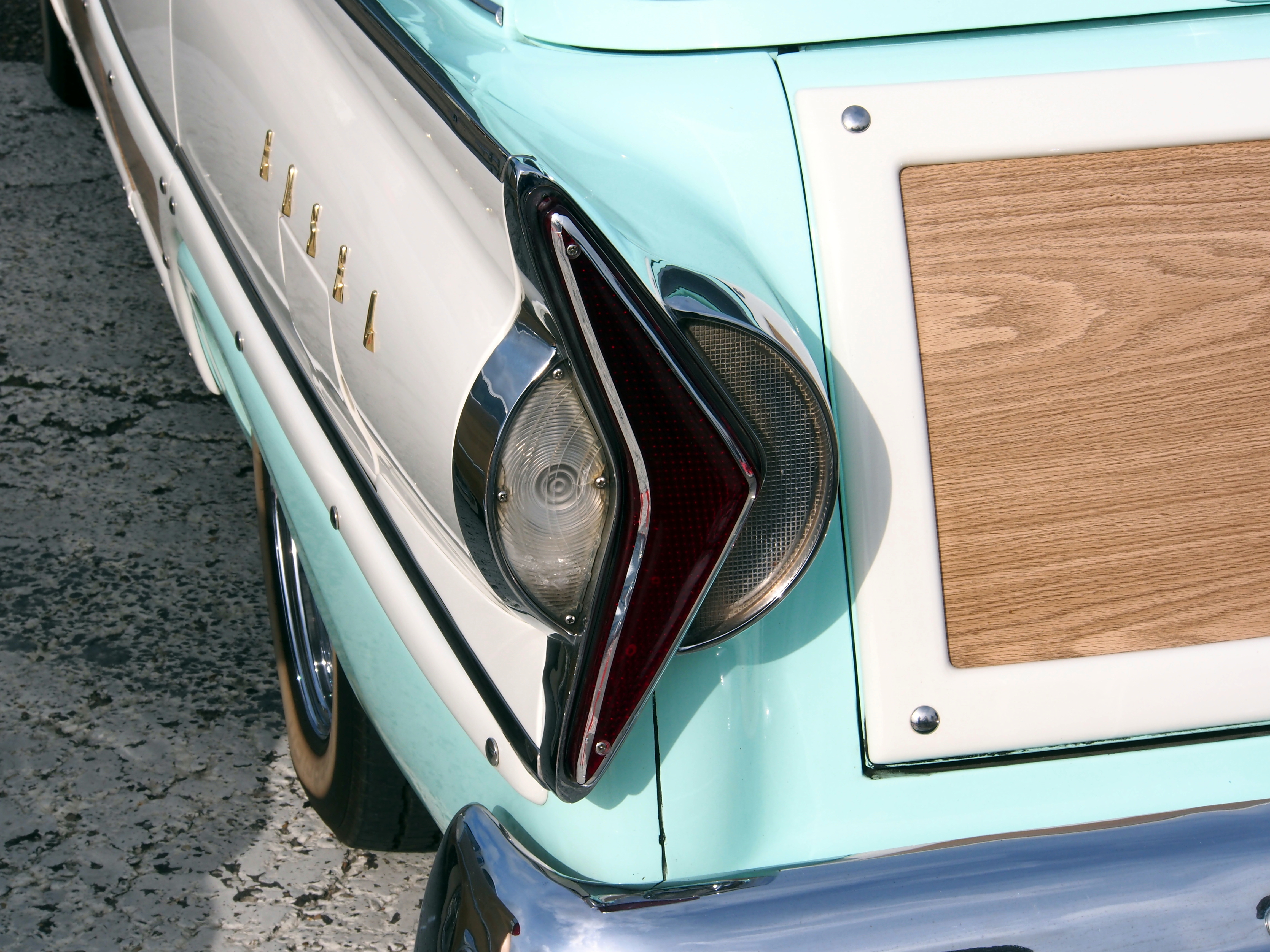 1958 Edsel Bermuda taillight